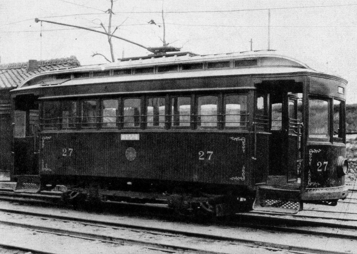 瀬戸電気鉄道 テ27